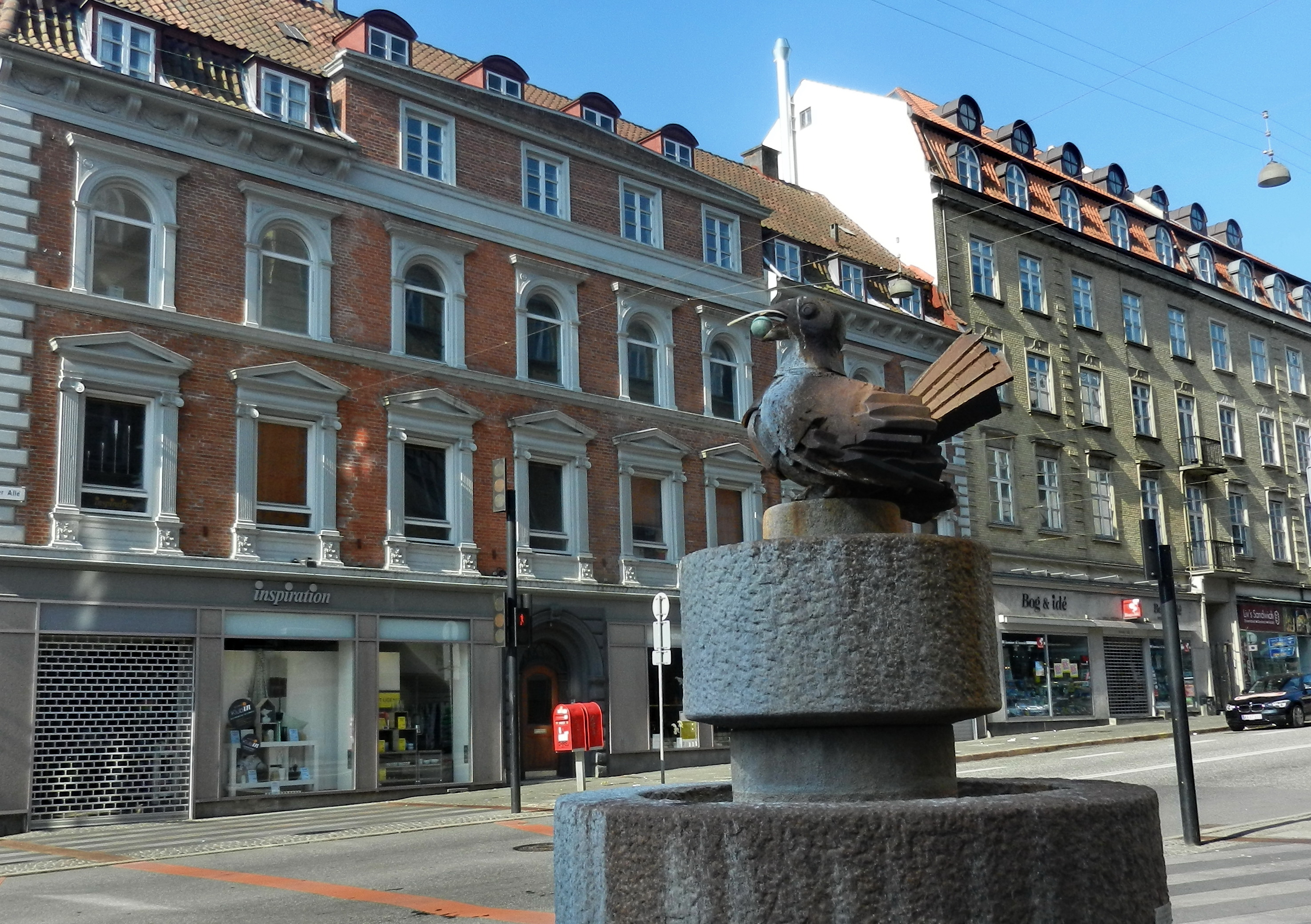 Aarhus